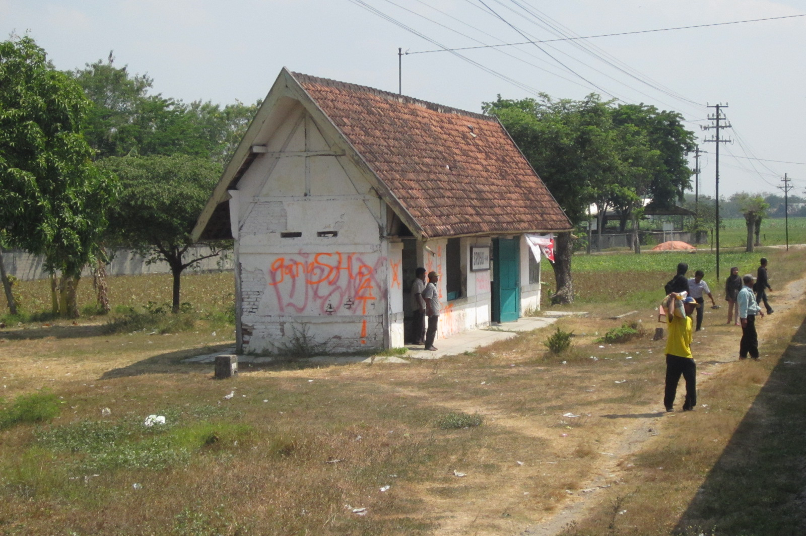 Halte Kereta api Sroyo, Bojonegoro.